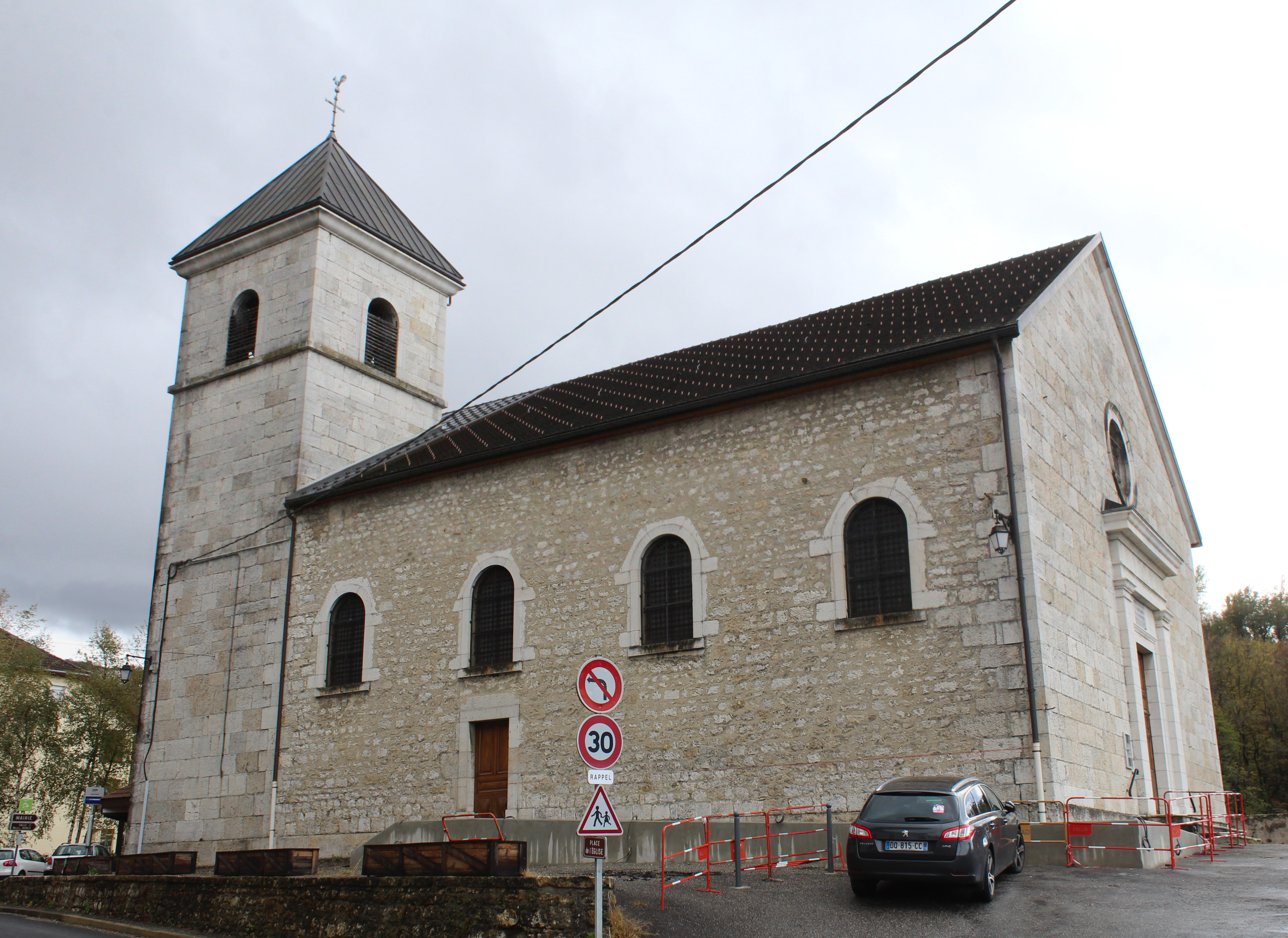 Église Saint-Amand de Lancrans, Valserhône.